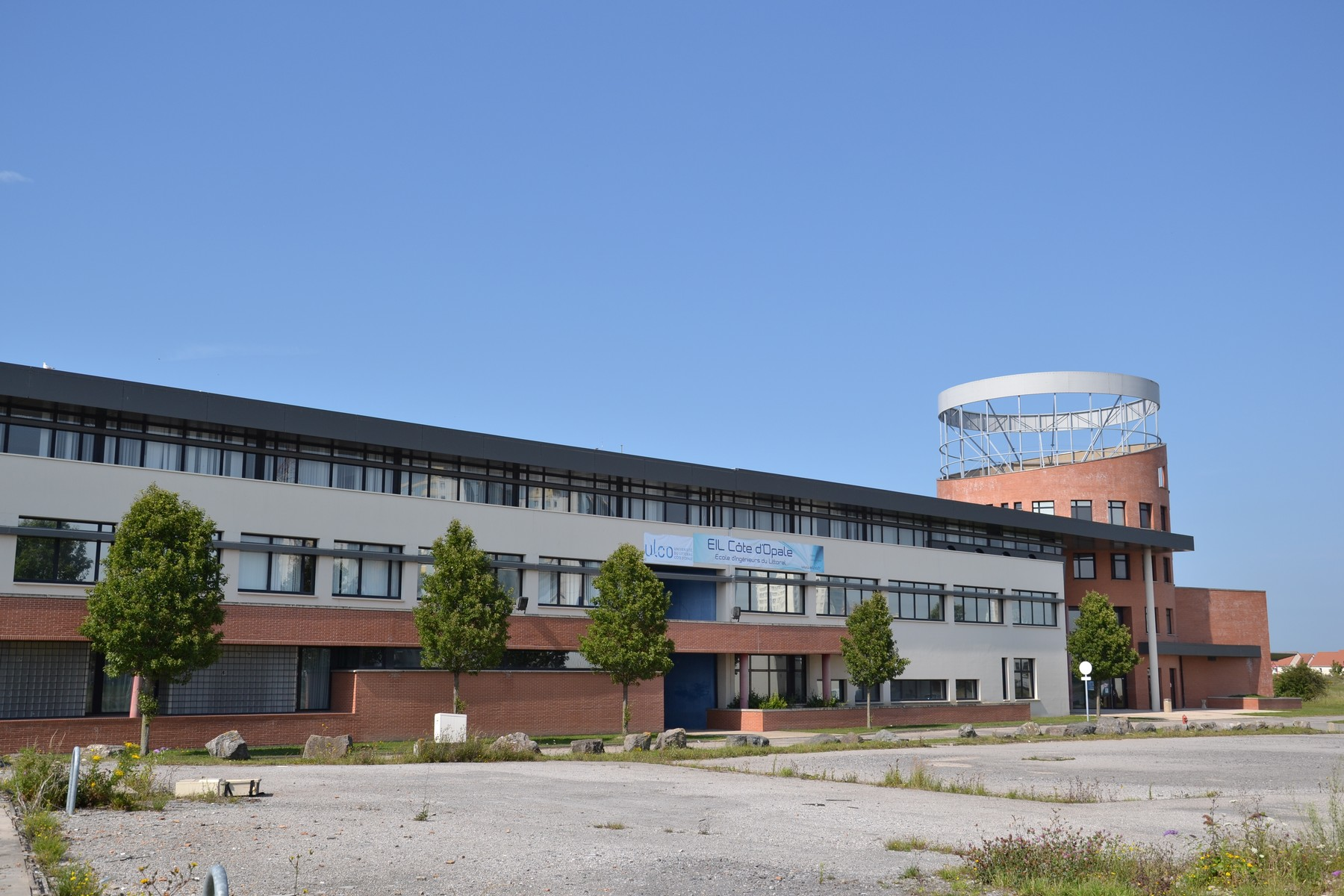 Université du Littoral Côte d'Opale - Bâtiment A (anciennement l'IUP)